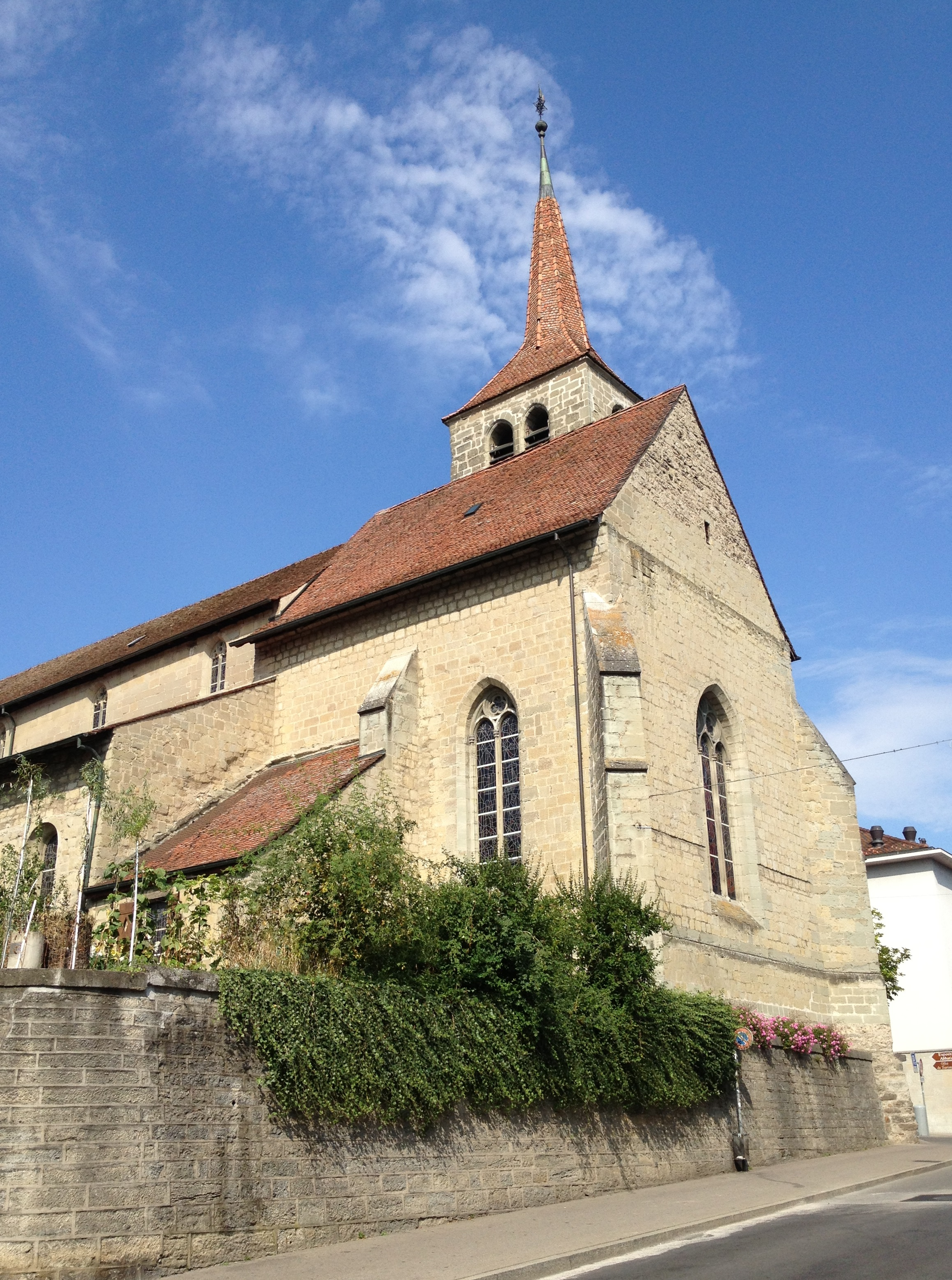 L'église Notre-Dame et le clocher de l'abbatiale de Payerne, en Suisse.